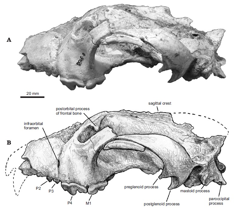 Simocyon batalleri, MNCN B−3458, Batallones−1, Madrid Province, Spain, cranium in left lateral view. A. Photograph. B. Schematic drawing showing the main anatomical features of this view (artwork by M. Antón).